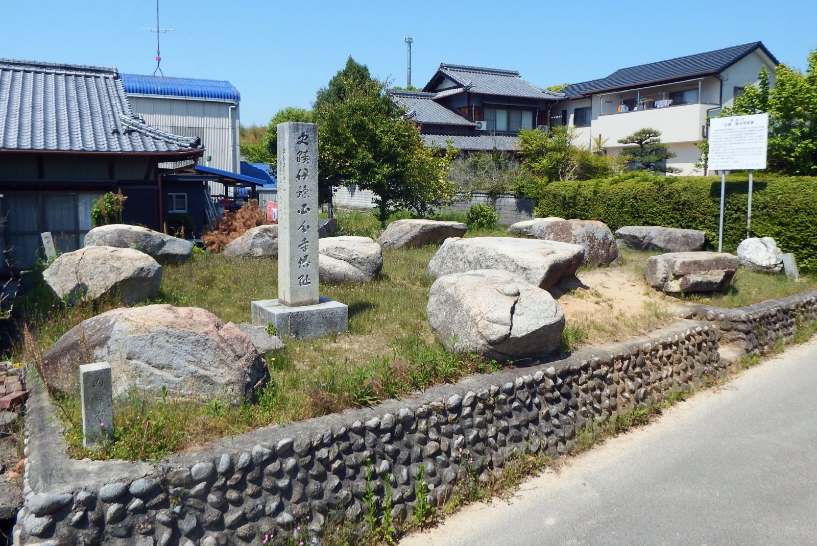 伊予国分寺塔跡